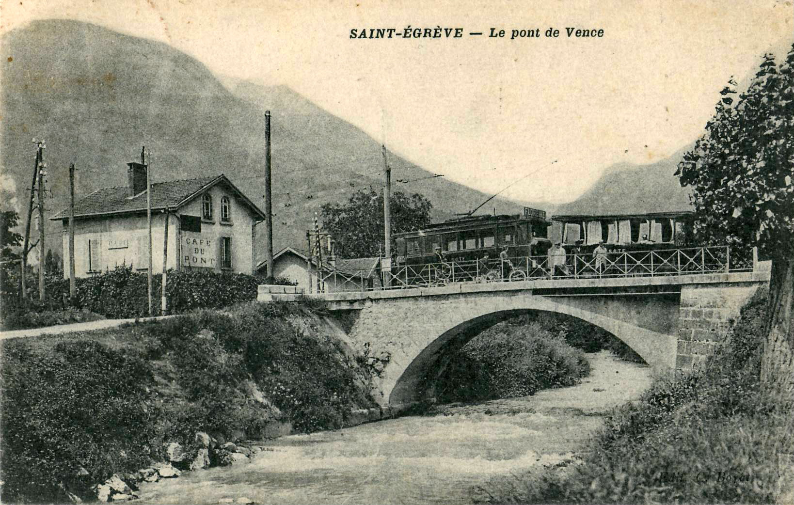 Carte postale ancienne éditée par C. Boyat : SAINT-ÉGRÈVE - Le Pont de Vence